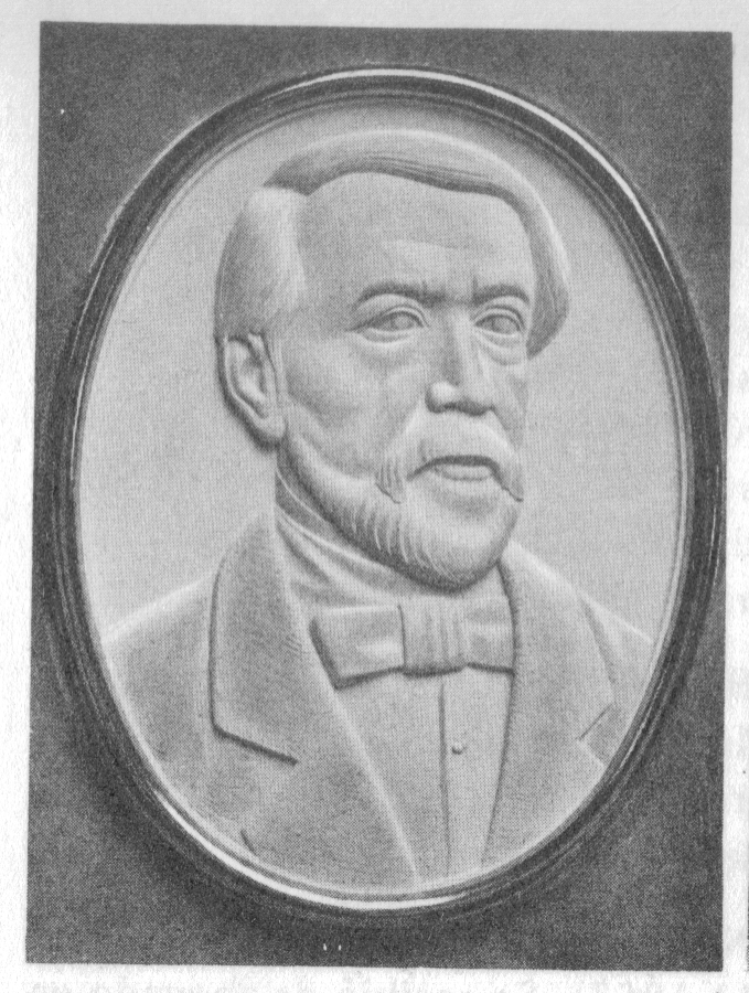 Retrato de Ponciano Arriaga, diputado constitiyente mexicano.